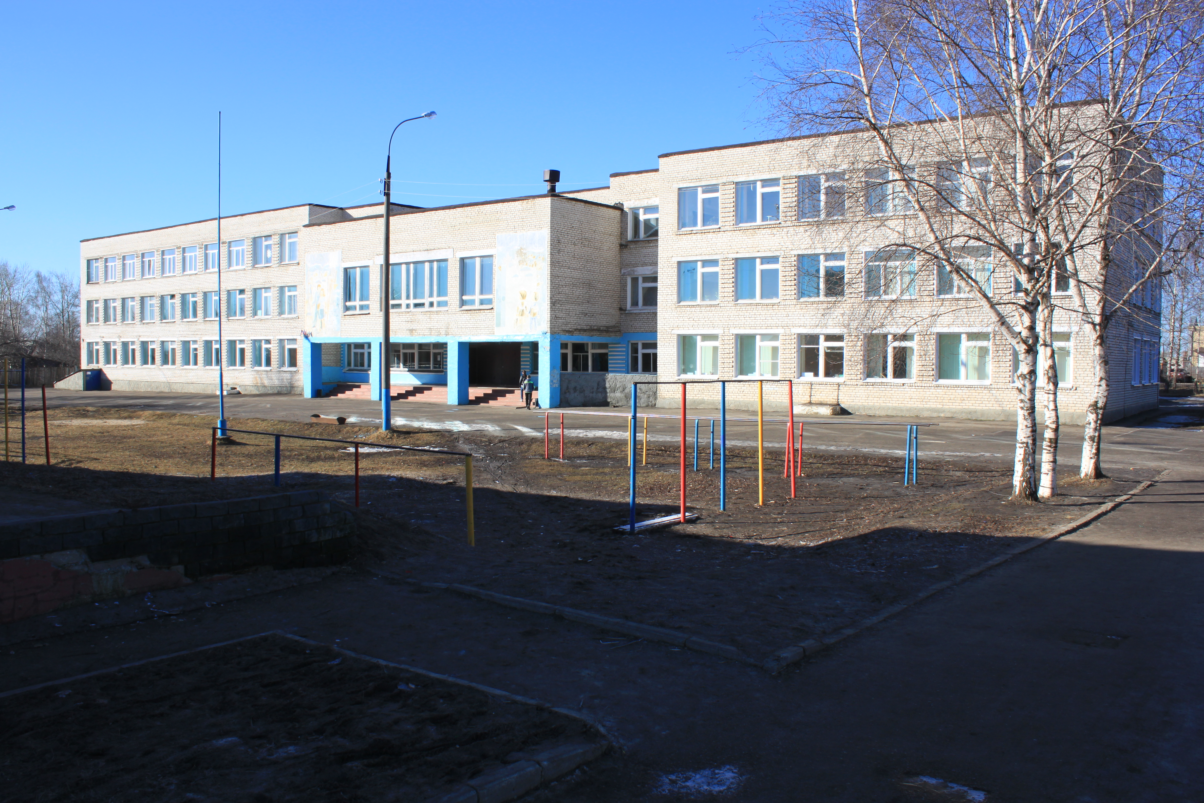 Выездное Арзамасский район Школа